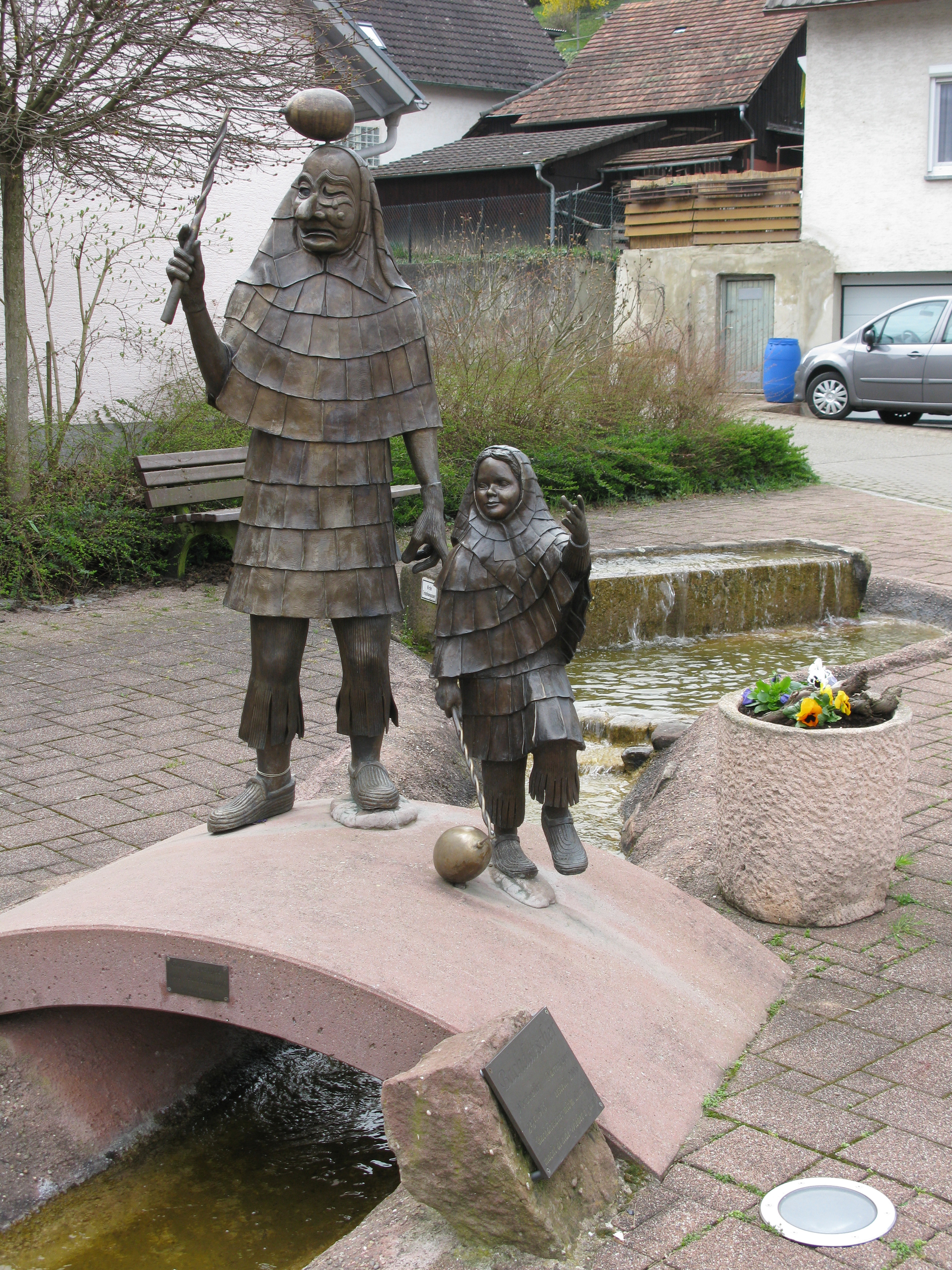 Bachdatscher-Brunnen in Nordweil